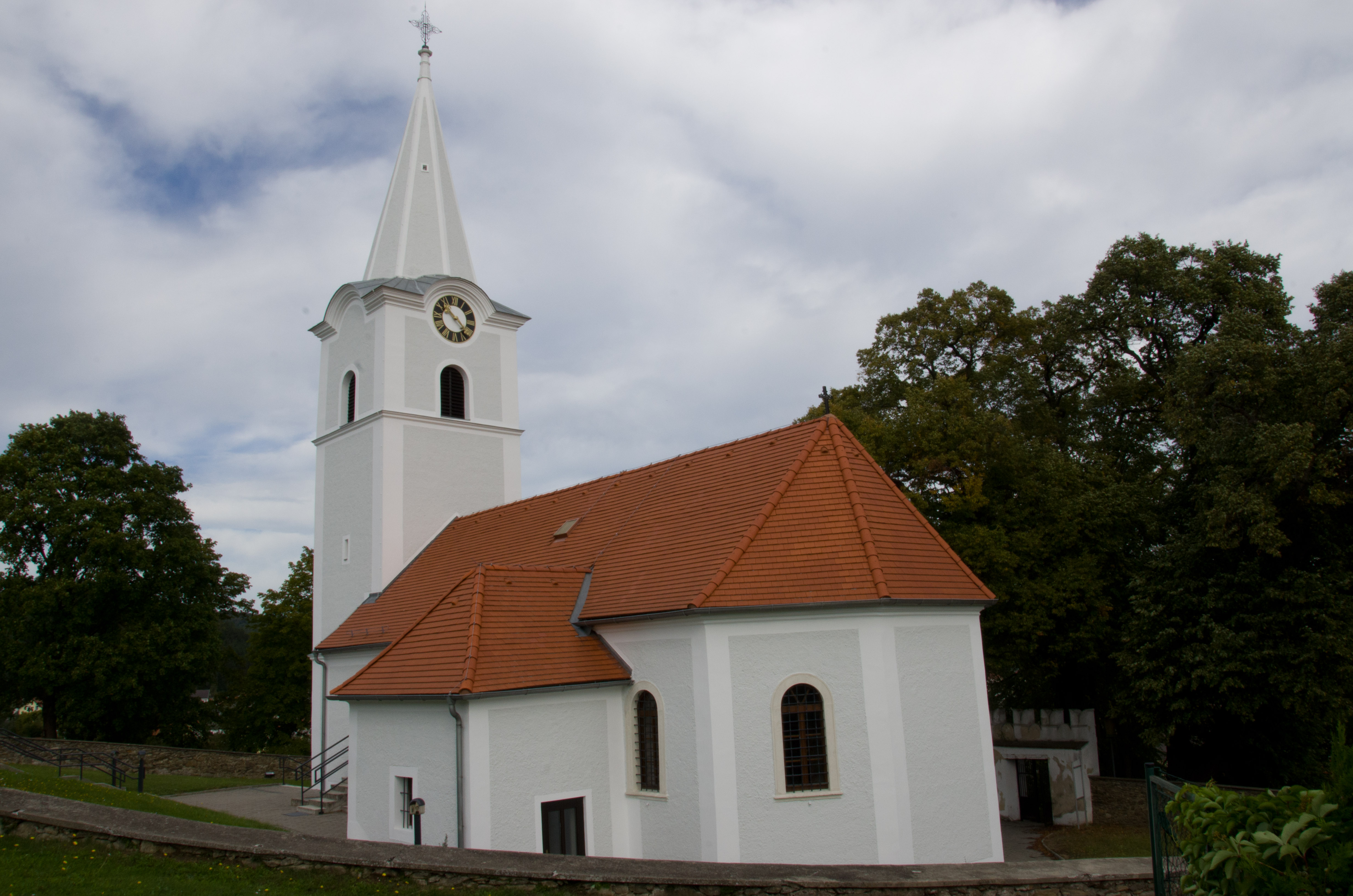 Kath. Pfarrkirche hl. Nikolaus und Friedhof